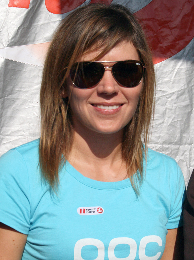 Karin Huttary am Tag des Sports 2009 auf dem Heldenplatz in Wien